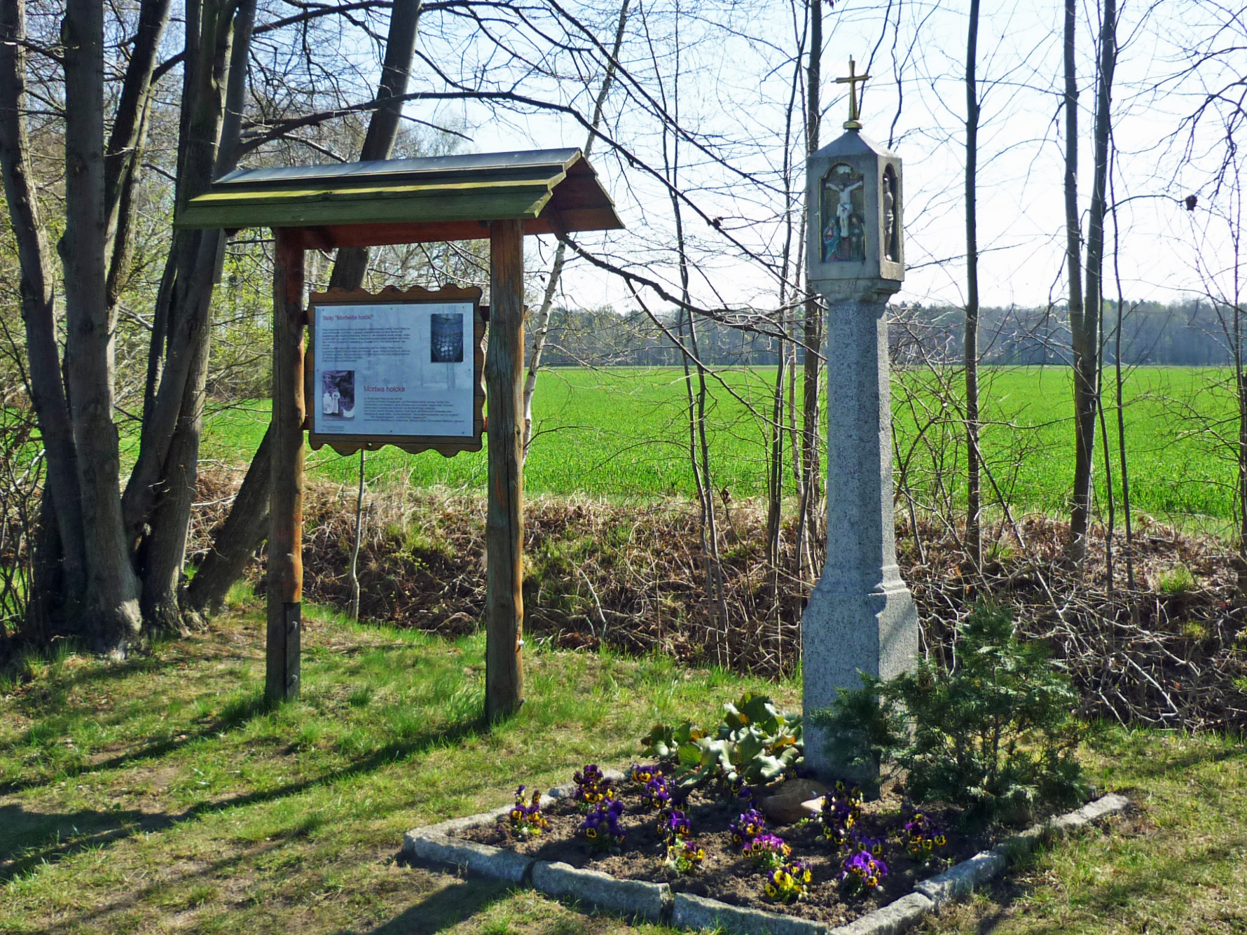 Bildstock in Kotten, an der Straße nach Cunnewitz Hornjoserbsce: Modlerski stołp blisko Koćiny při puću do Konjec